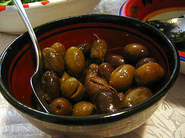 black olives